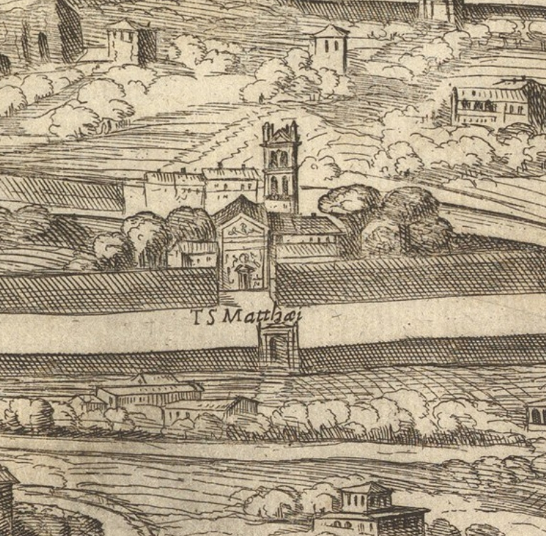 Pianta di Tempesta